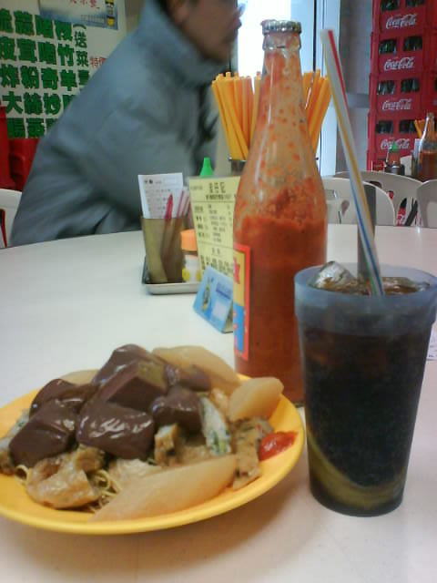 中文（香港）: 車仔麵